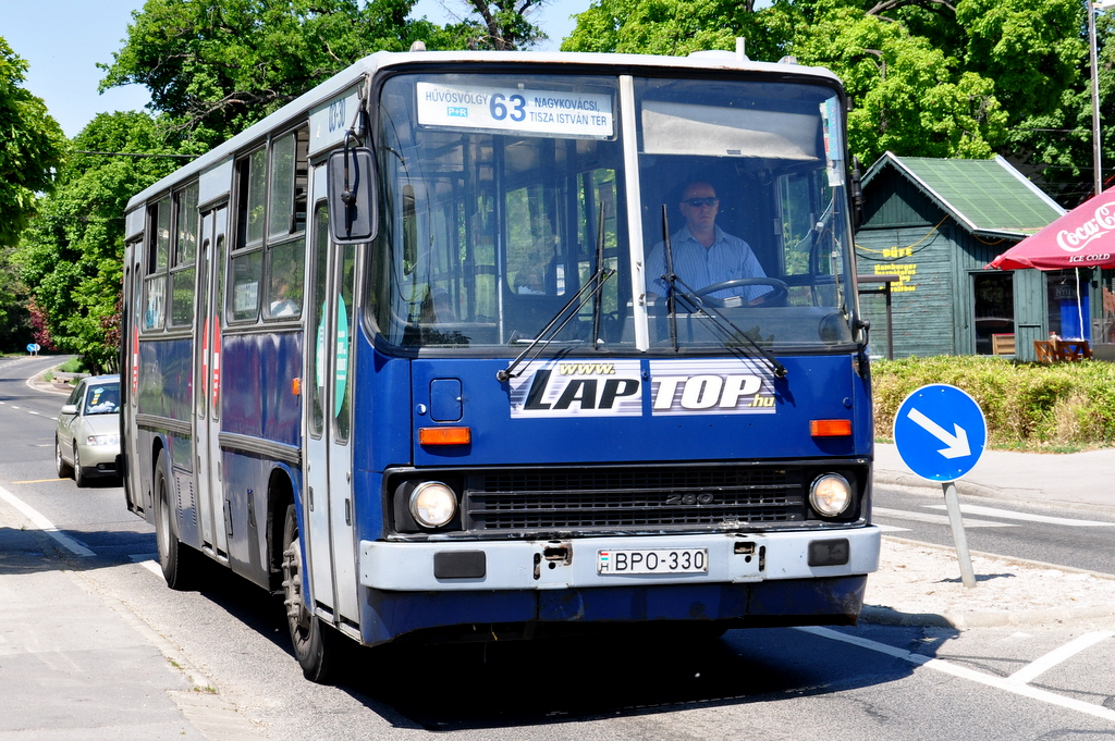 hu:63-as busz (Budapest)